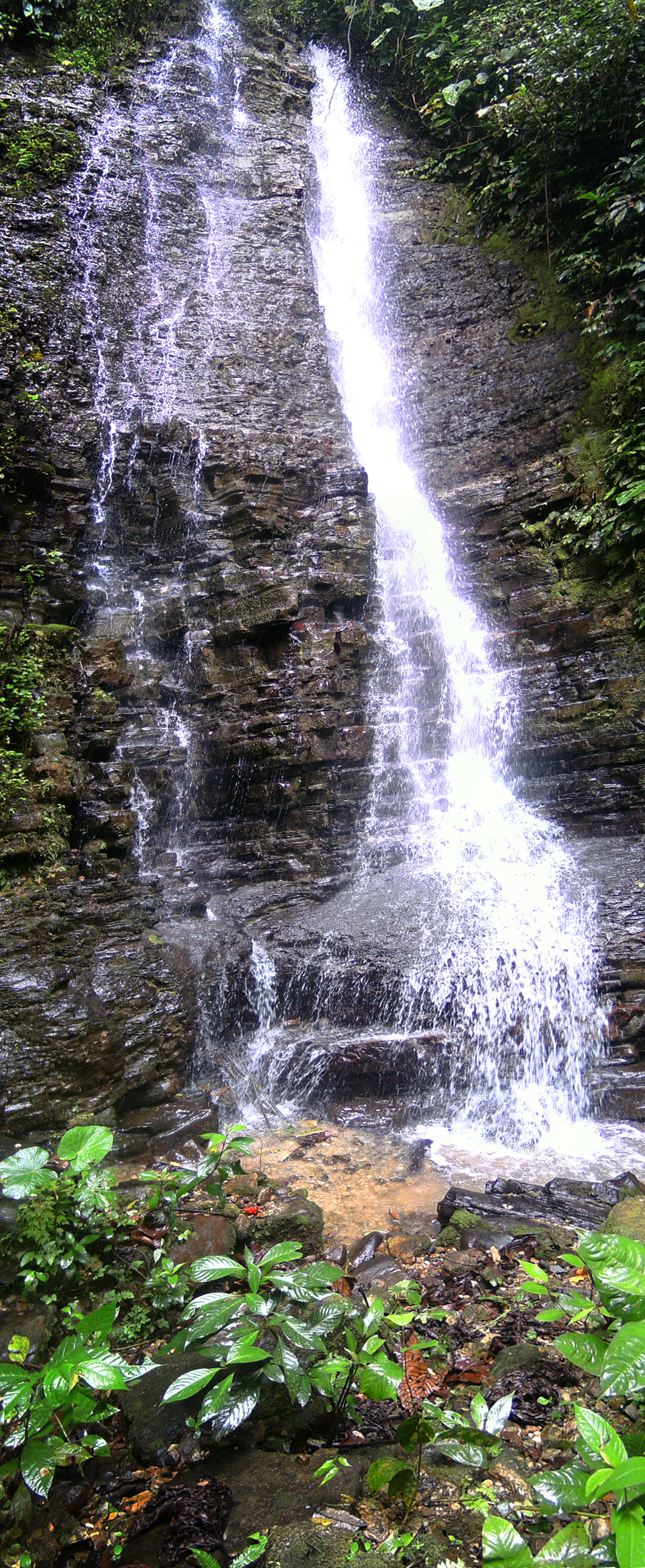 Cascada de 40m en Cascadas del valle misterioso, Huambi, Sucua, Ecuador